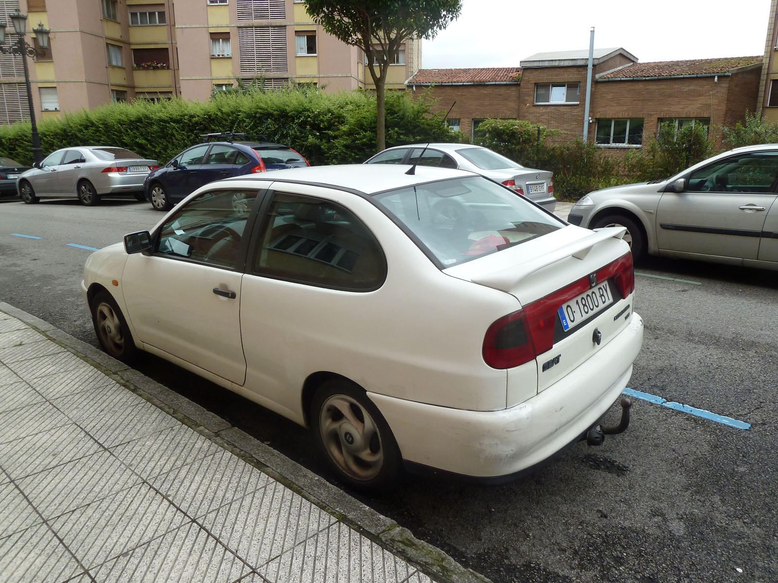 SEAT Córdoba 6K SX